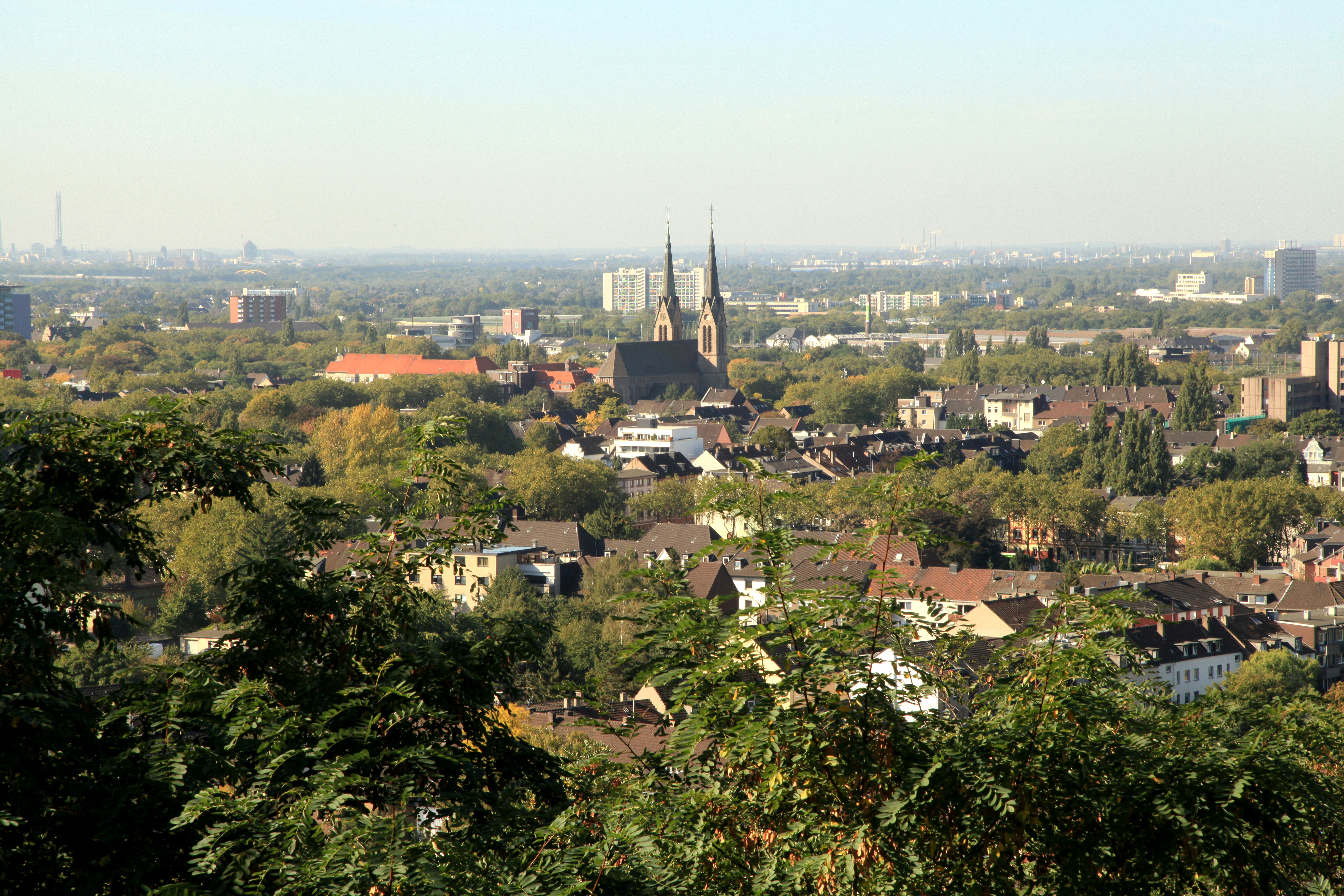 Blick vom Aussichtsturm der Knappenhalde zur Marienkirche in Oberhausen